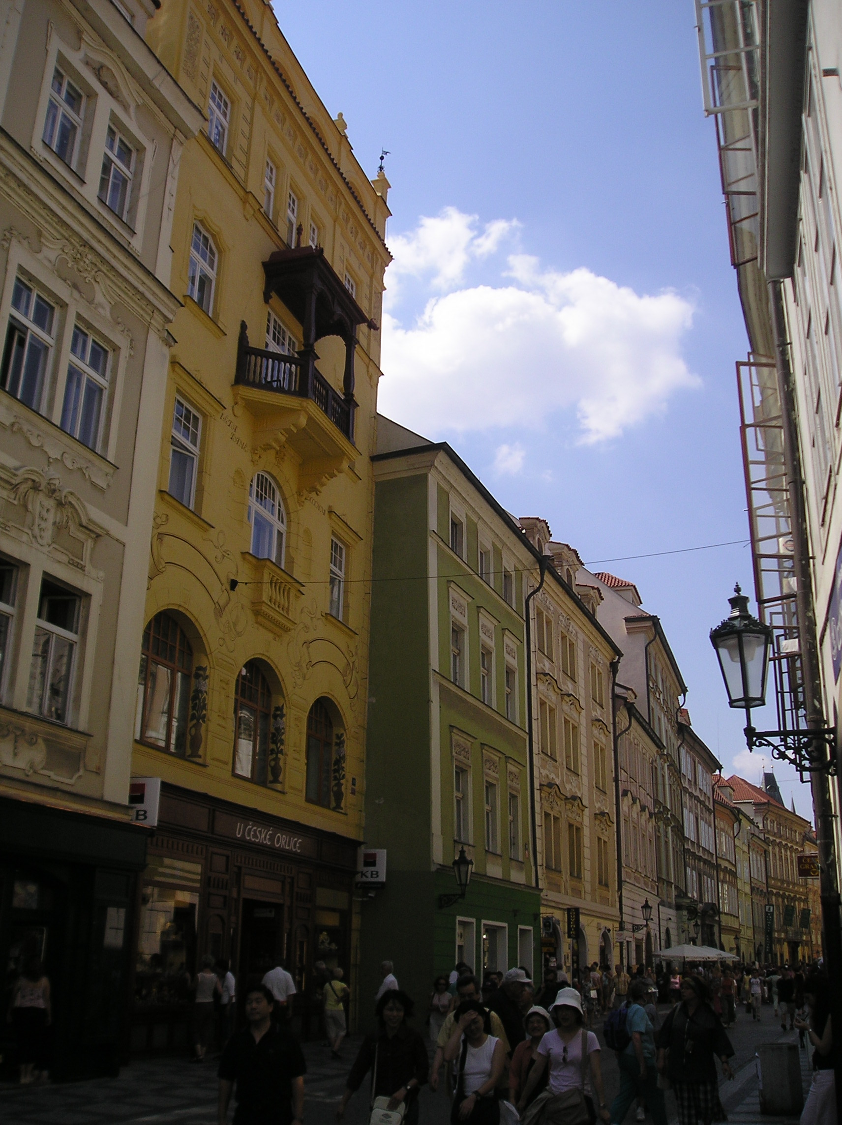 Questa foto rappresenta una vista di via Celetná Praga, è stata scattata da me, G. Salluzzi nell'agosto 2004 ed è rilasciata in Pubblico Dominio